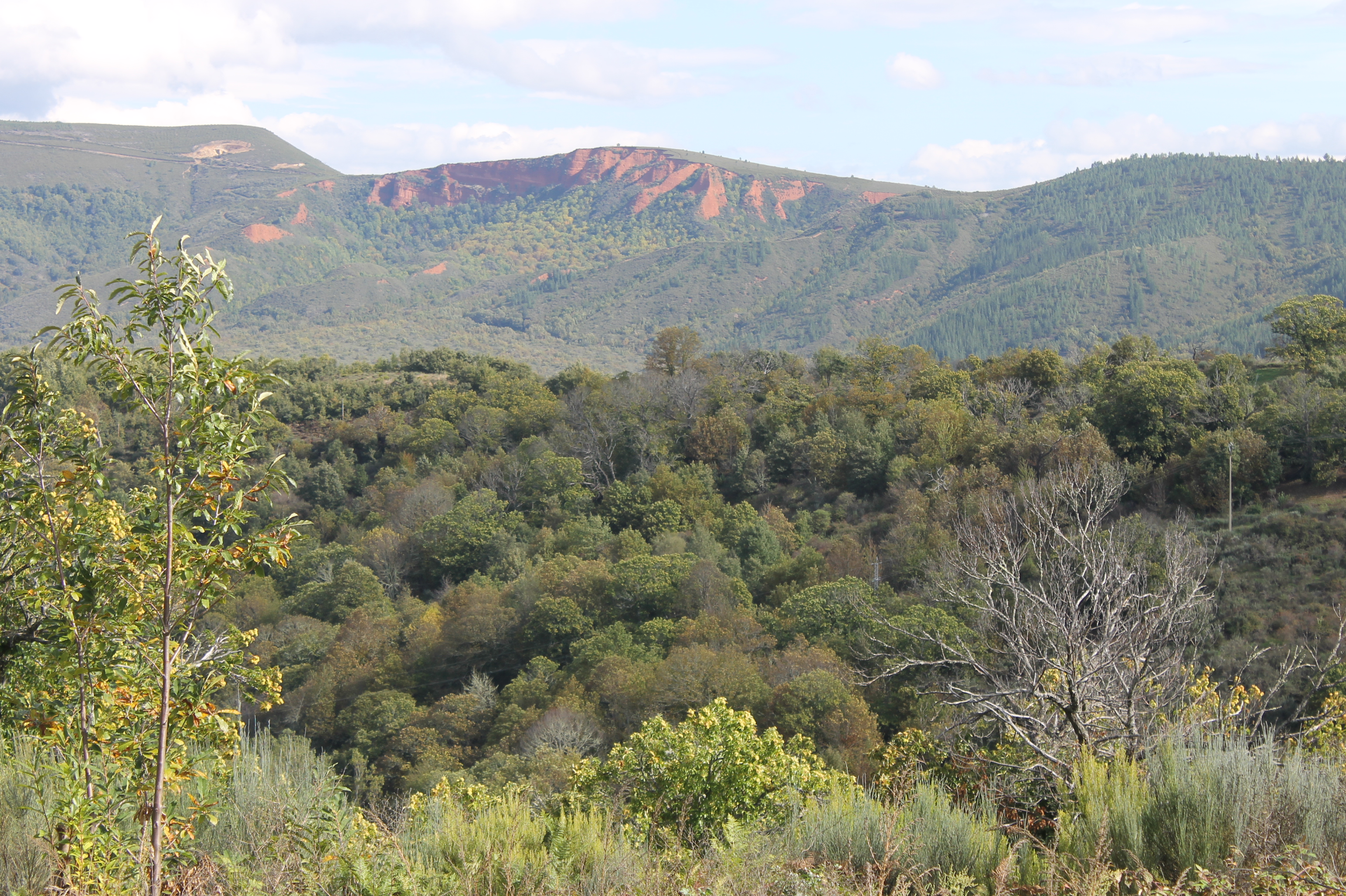 La antigua explotación minera de oro de La Leitosa cerca de Prado de Paradiña al sur de la Sierra de los Ancares This is a photography of a Special Area of Conservation in Spain with the ID: ES4130010. Natura2000 entry, EEA entry